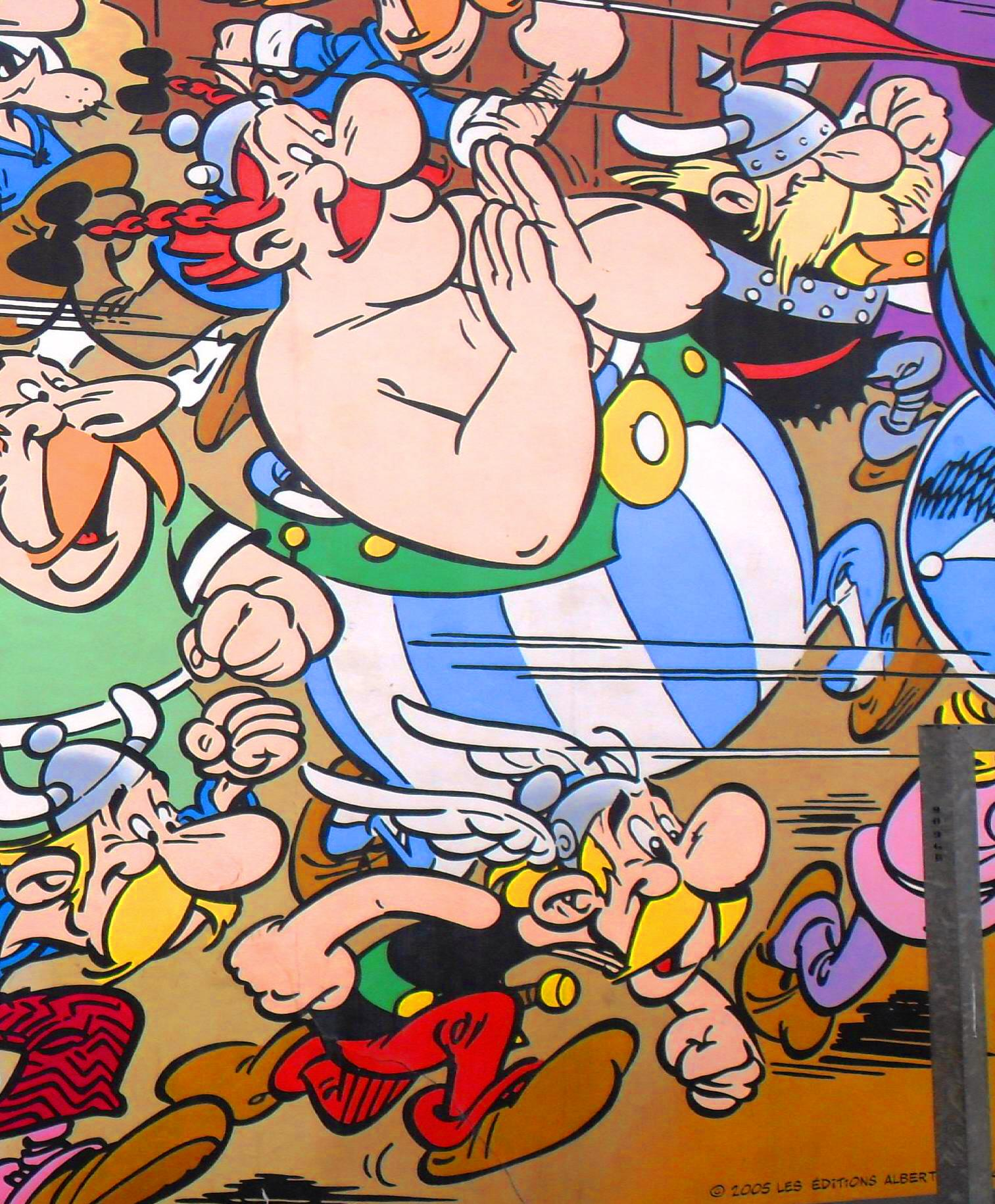 Détail d'une peinture murale avec Astérix et Obélix, héros de la BD de Goscinny et Uderzo. Lieu : Rue de la Buanderie 33/35 (Washuisstraat 33/35), École maternelle 8/2, ville de Bruxelles, Belgique. Extrait retouché de File:Comic wall Asterix & Obelix, Goscinny and Uderzo. Brussels.jpg.